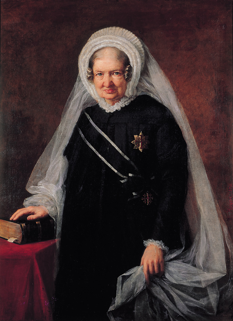 Portrait of Luise von Schierstedt (1794-1876)